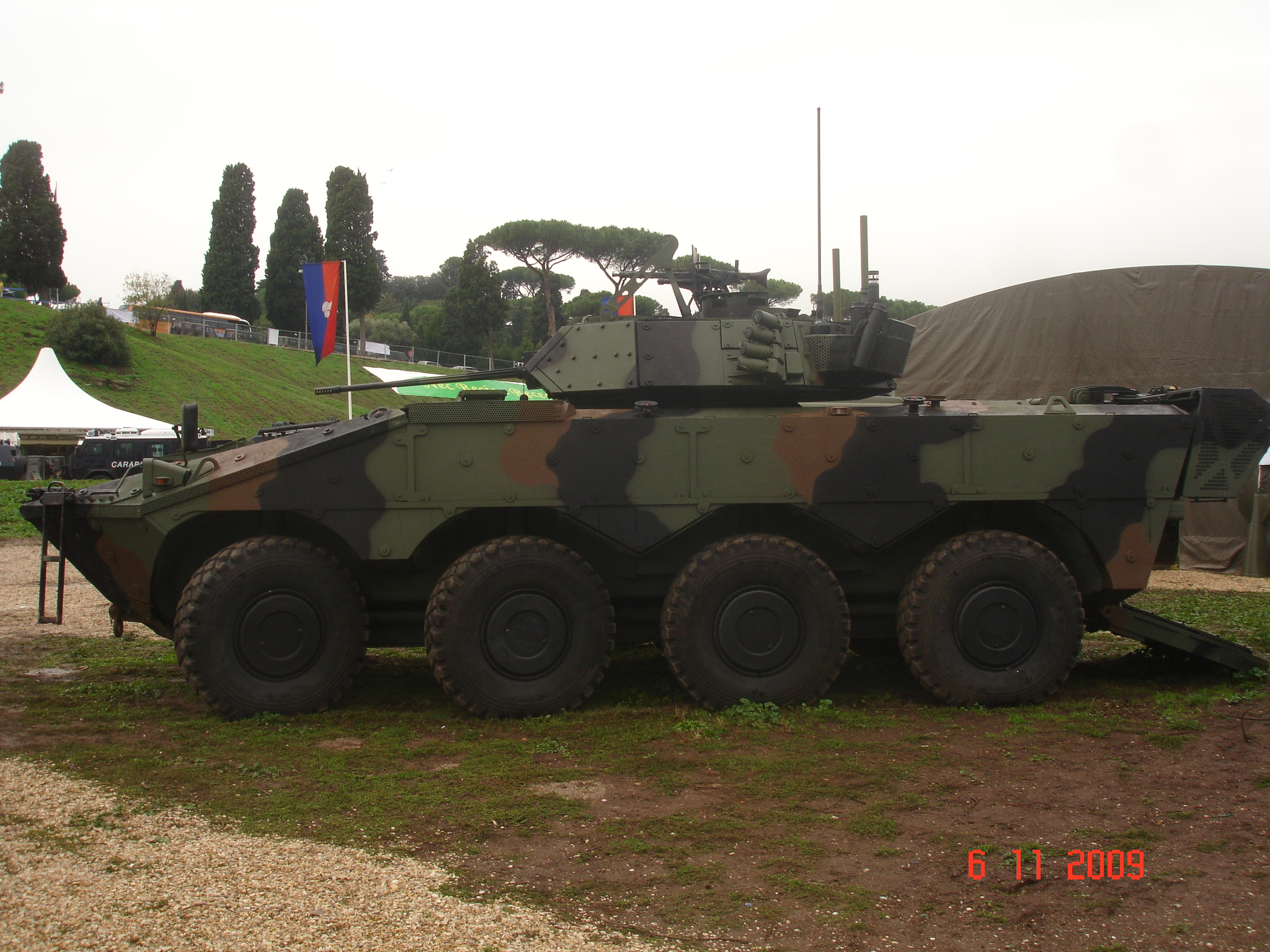 VBM freccia esposto a Roma in occasione delle forze armate.